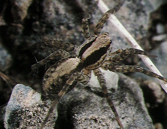 female Pardosa laevitarsis from Okinawa.